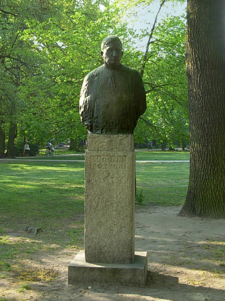 Galeria rzeźb wirtuozów przed Filharmonią Pomorską w Bydgoszczy